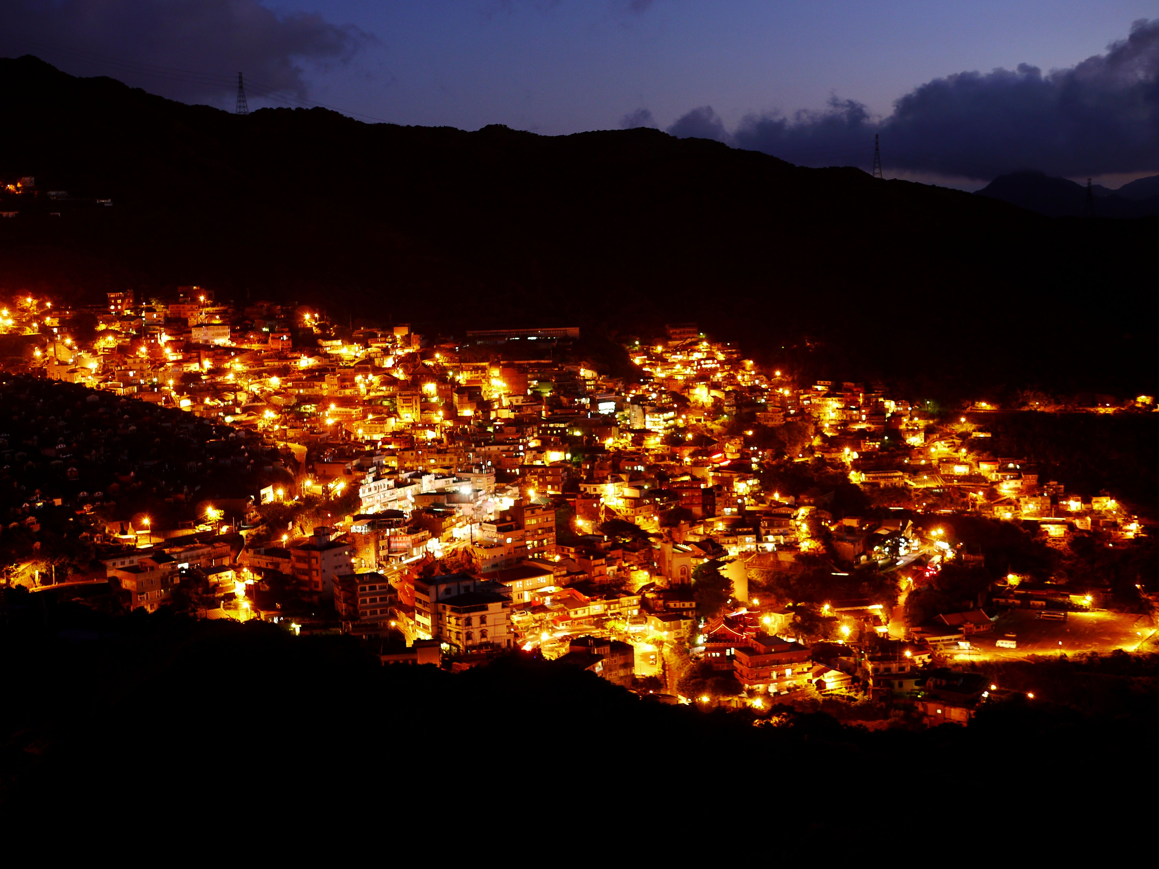 由基隆山遠眺九份夜景